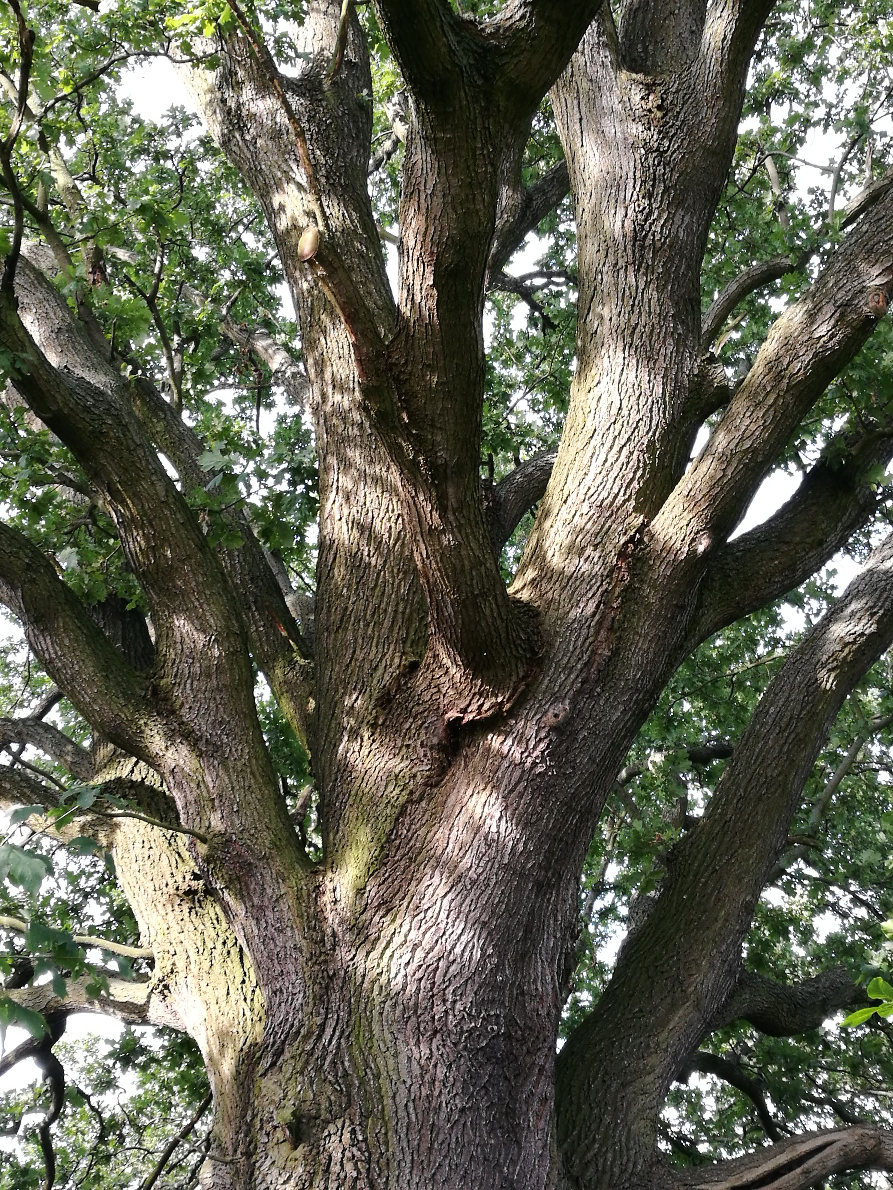 Stieleiche Biospährenreservat Mittelelbe